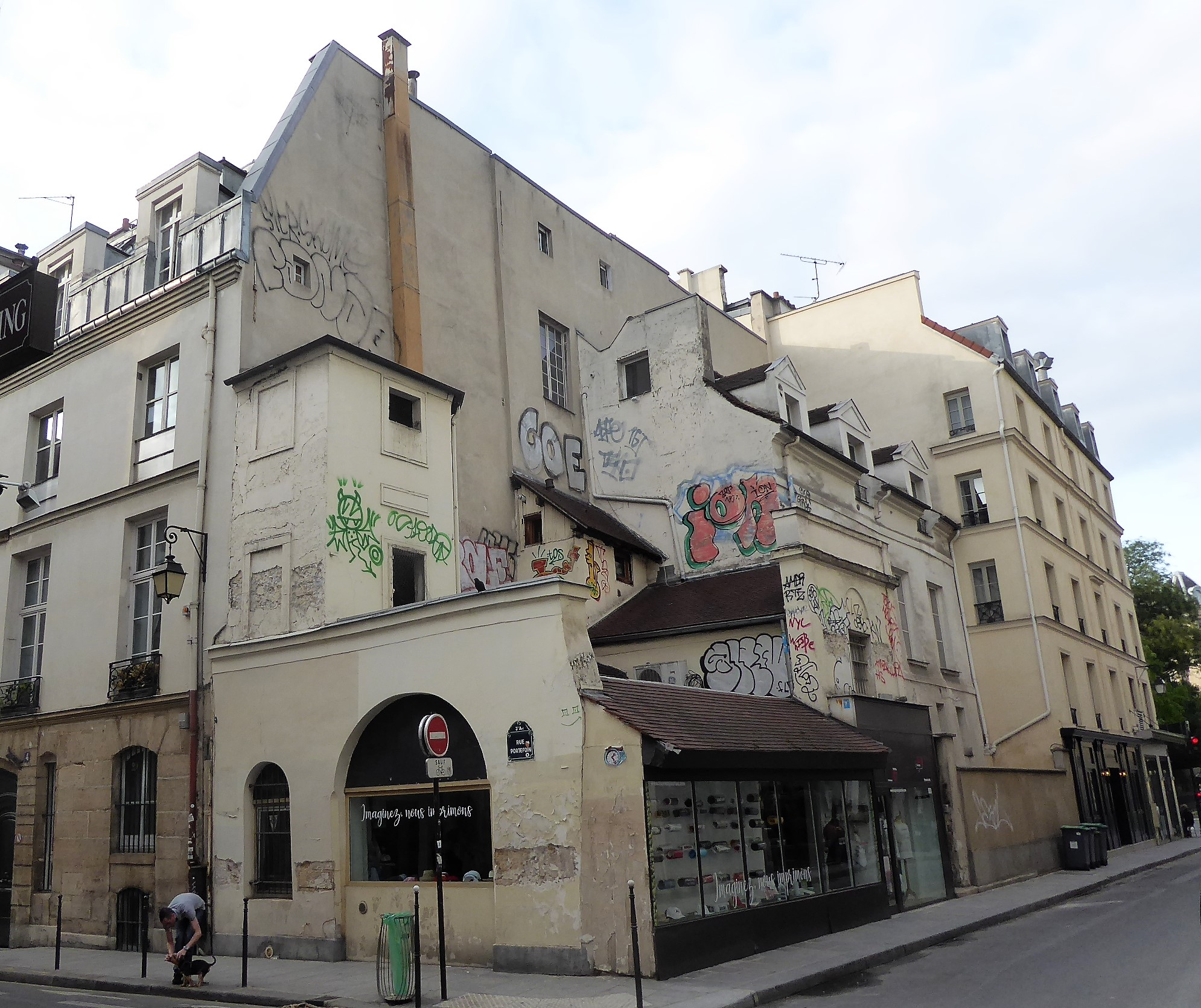 Rue des Archives angle rue Portefoin